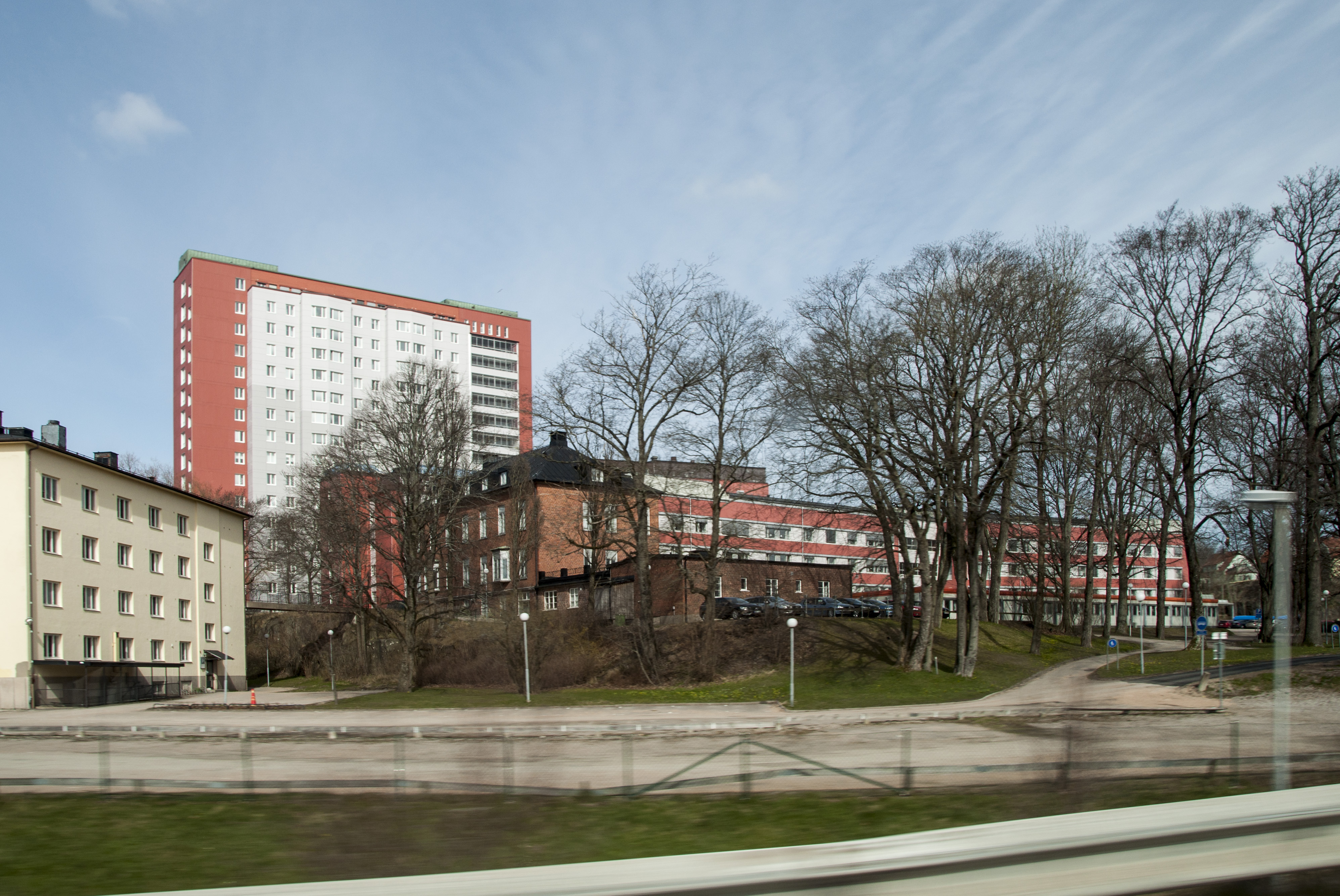 Uddevalla sjukhus. Arkitekt Gustaf Birch-Lindgren. Ny fasadbeklädnad på 2010-talet